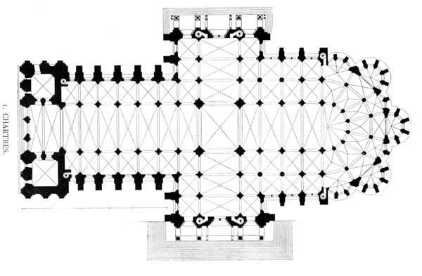 Chartres. Floorplan, from G. Dehio and G. von Bezold, Die Kirchliche Baukunst des Abendlandes, Stuttgart, 1887–1902, plate 363 Lithograph